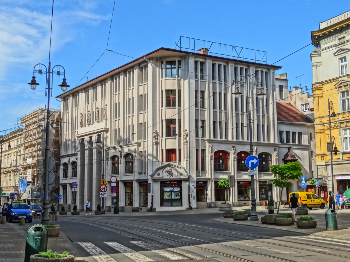 Dom Towarowy Jedynak, ul. Gdańska 15 w Bydgoszczy (zbud. 1910)